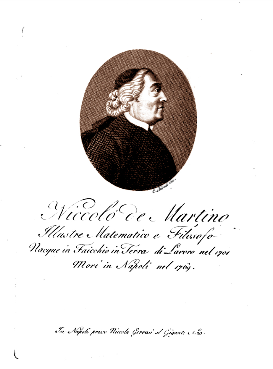 ritratto di Niccolò Antonio de Martino